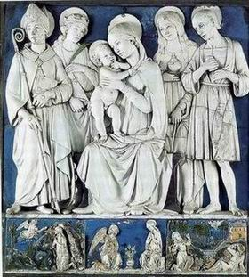 Oratorio del buonconsiglio, madonna col bambino e santi, bottega di andrea della robbia